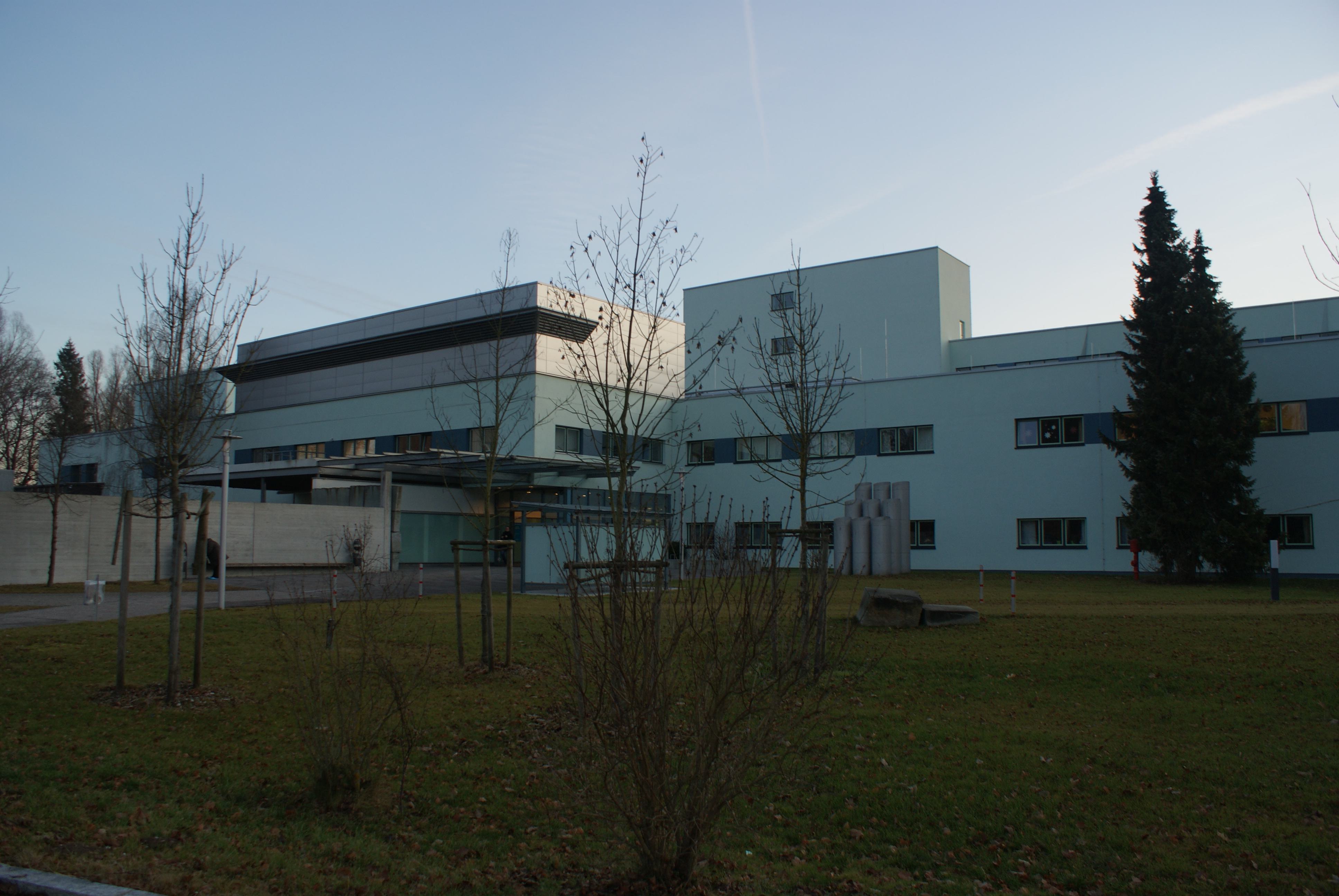 Ansicht des Klinikums Süd in Augsburg-Haunstetten